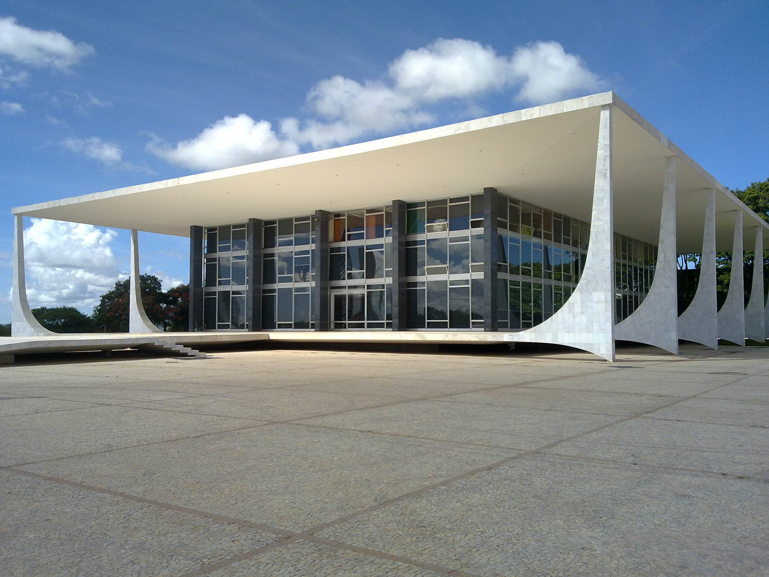 Foto do Supremo Tribunal Federal do Brasil.